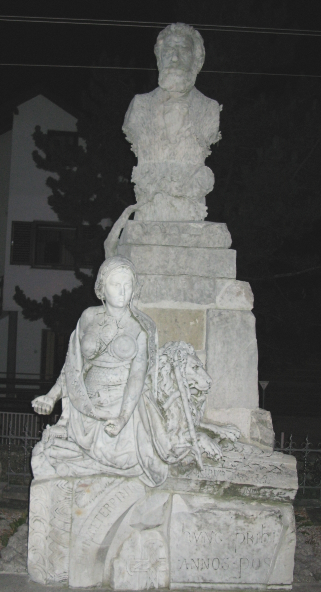 Spomenik Anti Starčeviću pred crkvom sv. Mirka u Šestinama